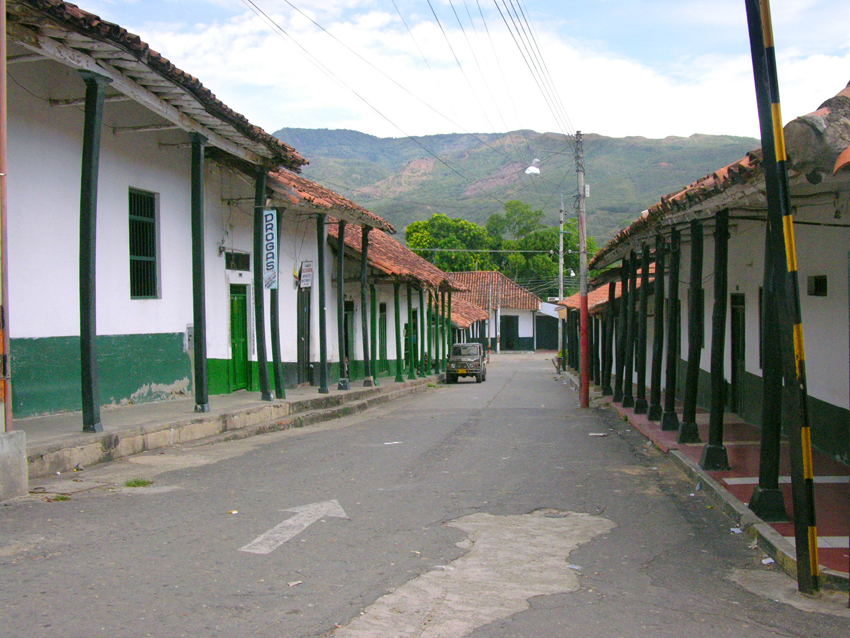 Centro Histórico de la Ciudad de Ambalema